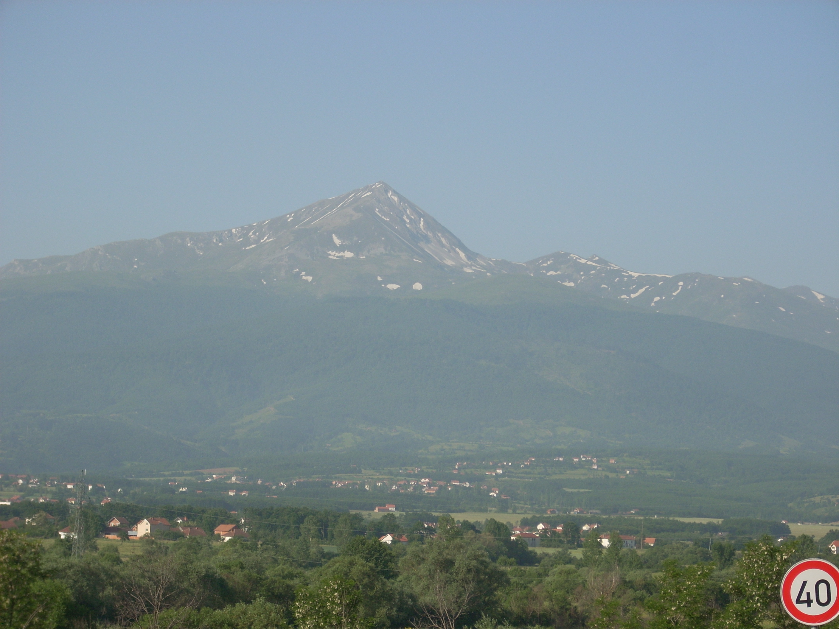 Luboten peak seen from Kosovo